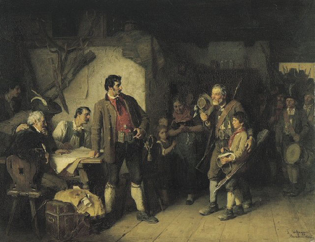 Speckbacher und sein Sohn Anderl im St. Johanner Bärenwirtshaus